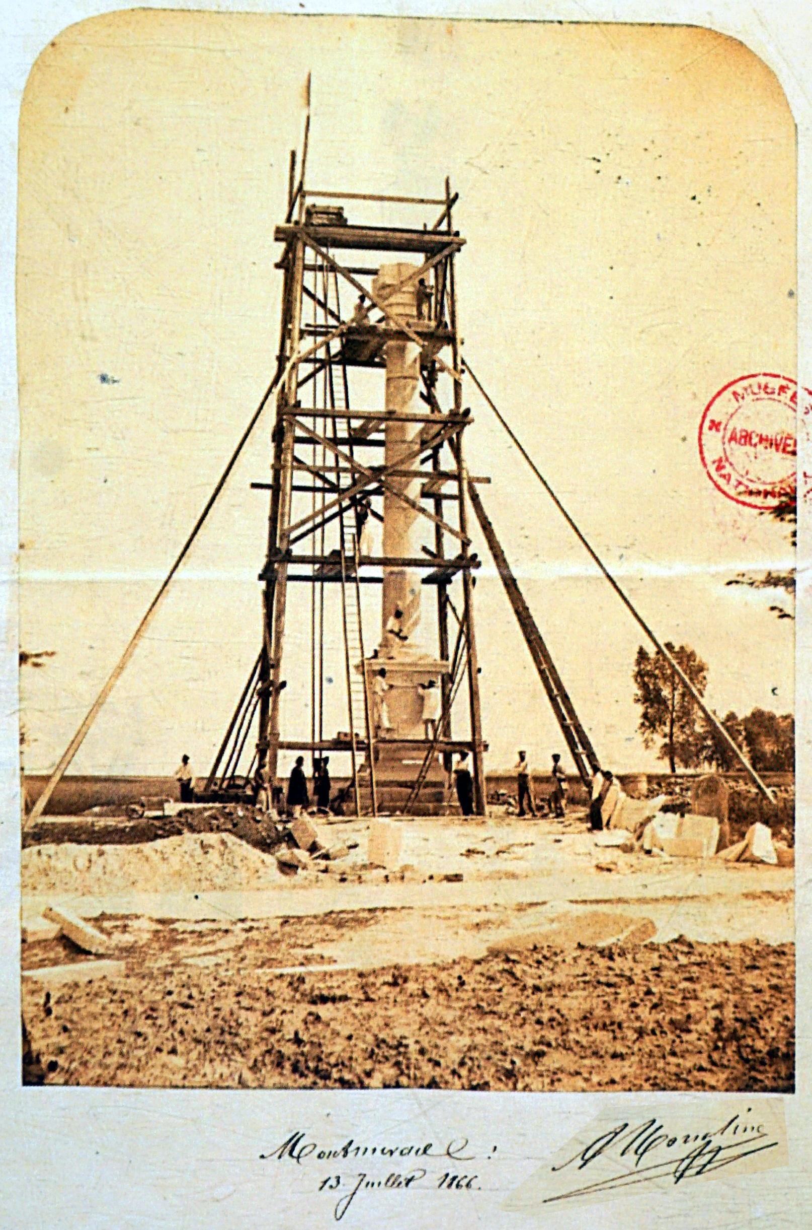 image du projet du Mémorial napoléonien à Marchais-en-Brie.